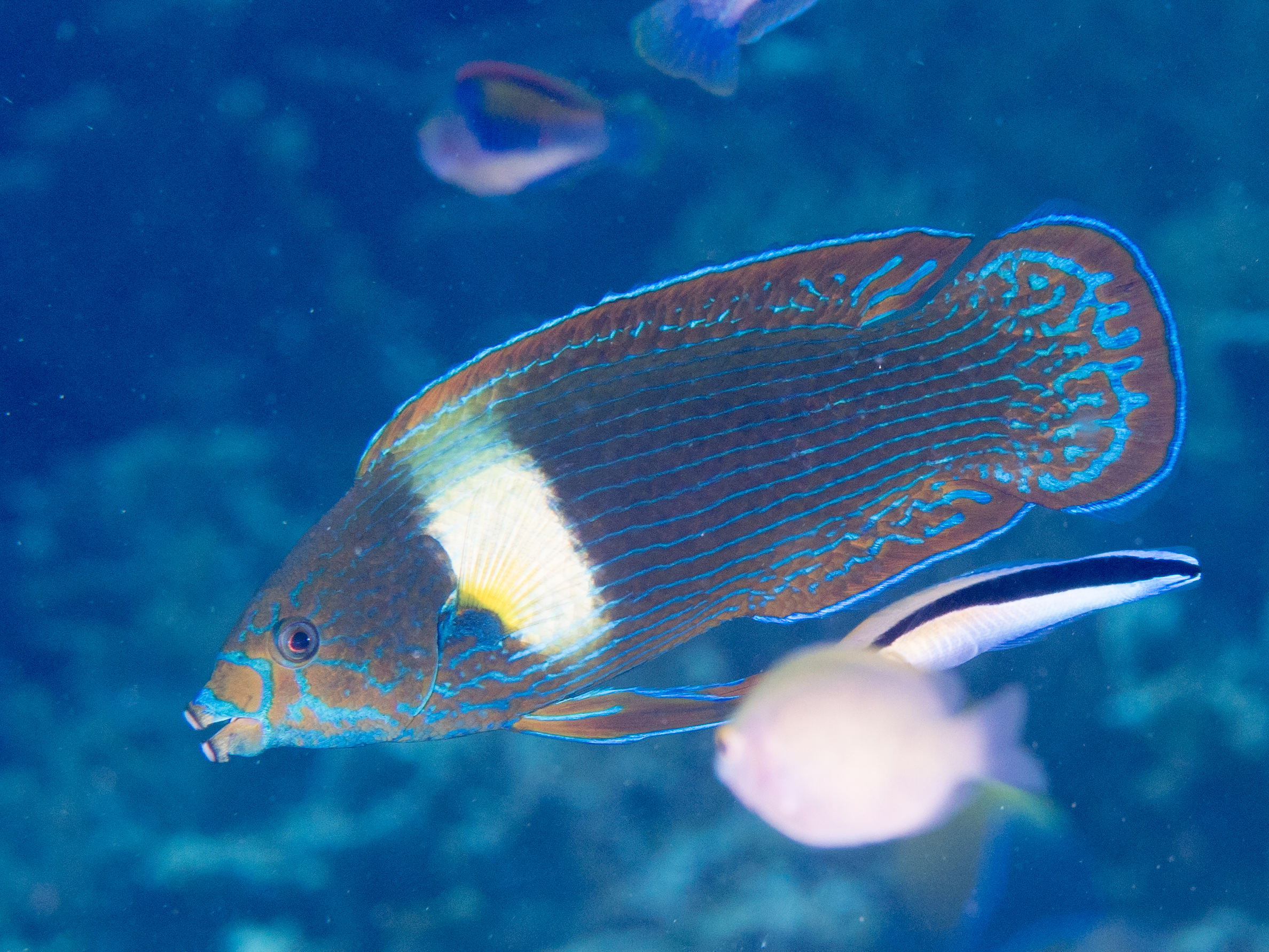 Tubelip wrasse (Labrichthys unilineatus). Raja Ampat